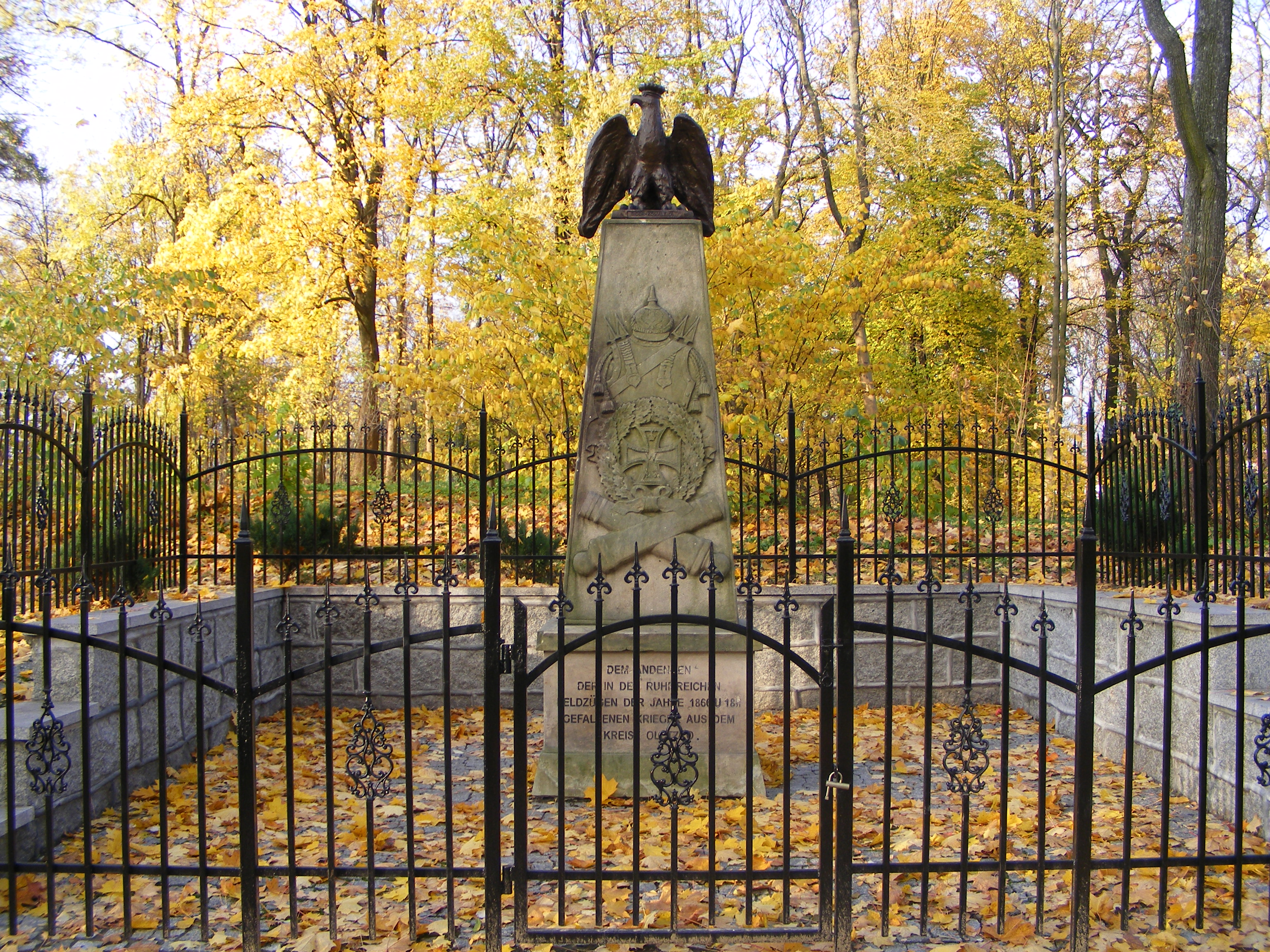 Niemiecki Pomnik na miejscowym Cmentarzu.